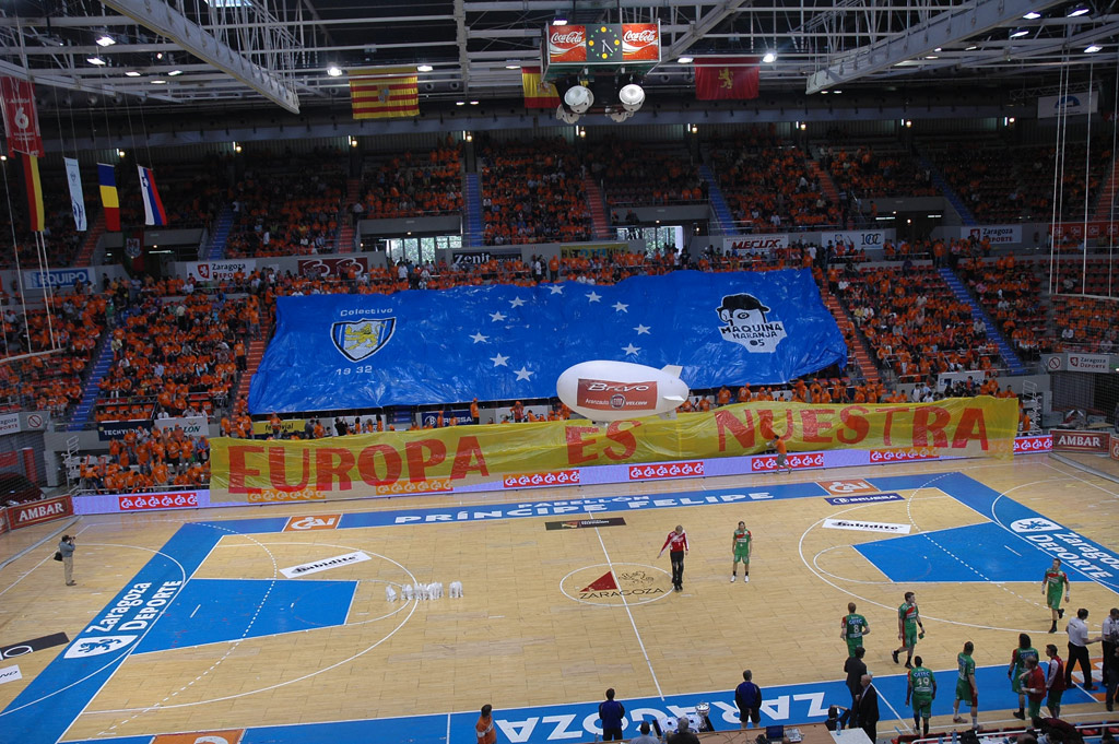 "Fotografía de la final de la Copa EHF del año 2007 entre el CAI Aragón y el Magdeburgo, en el Pabellón Príncipe Felipe de Zaragoza"